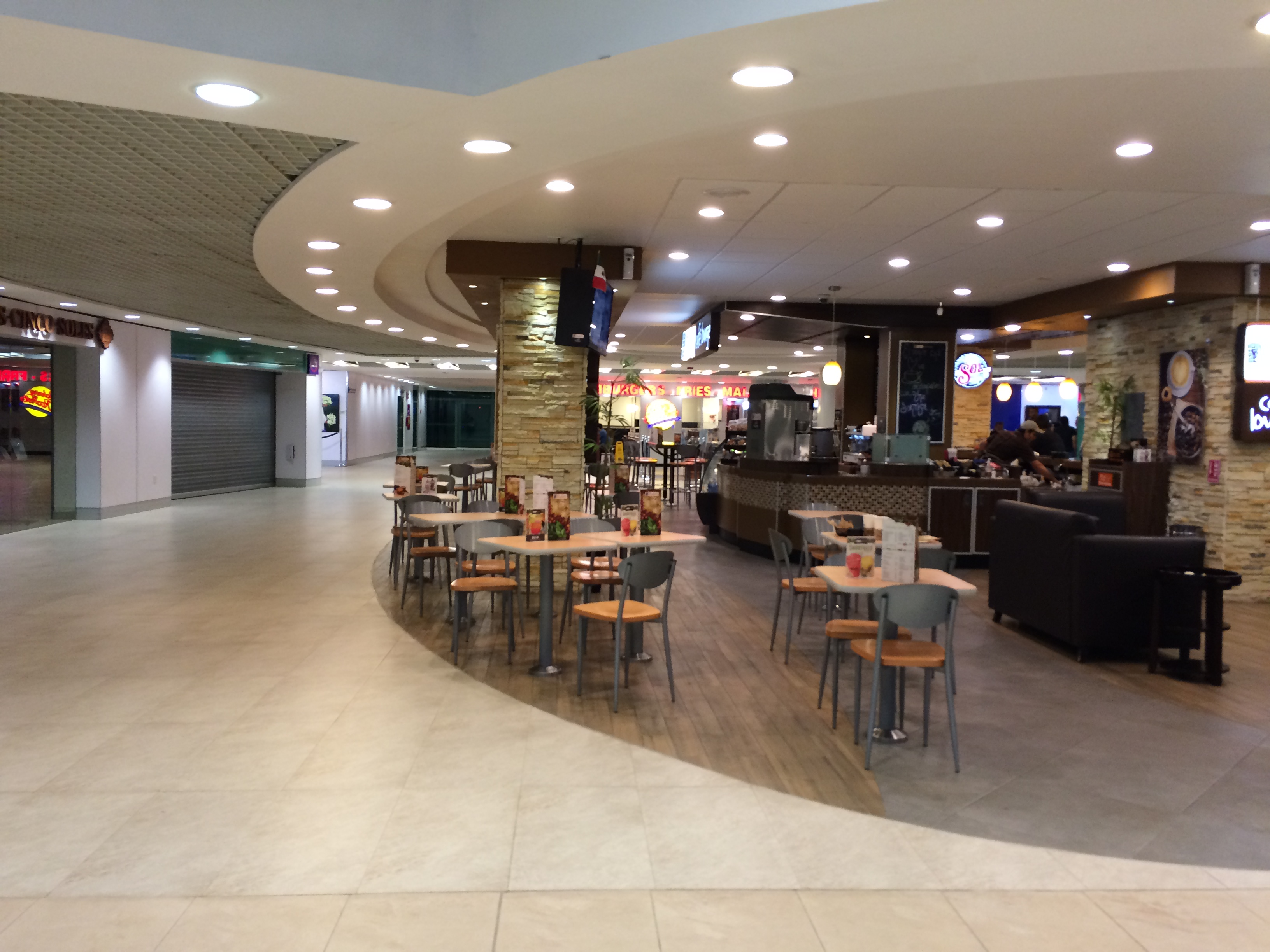 Área de llegadas del aeropuerto